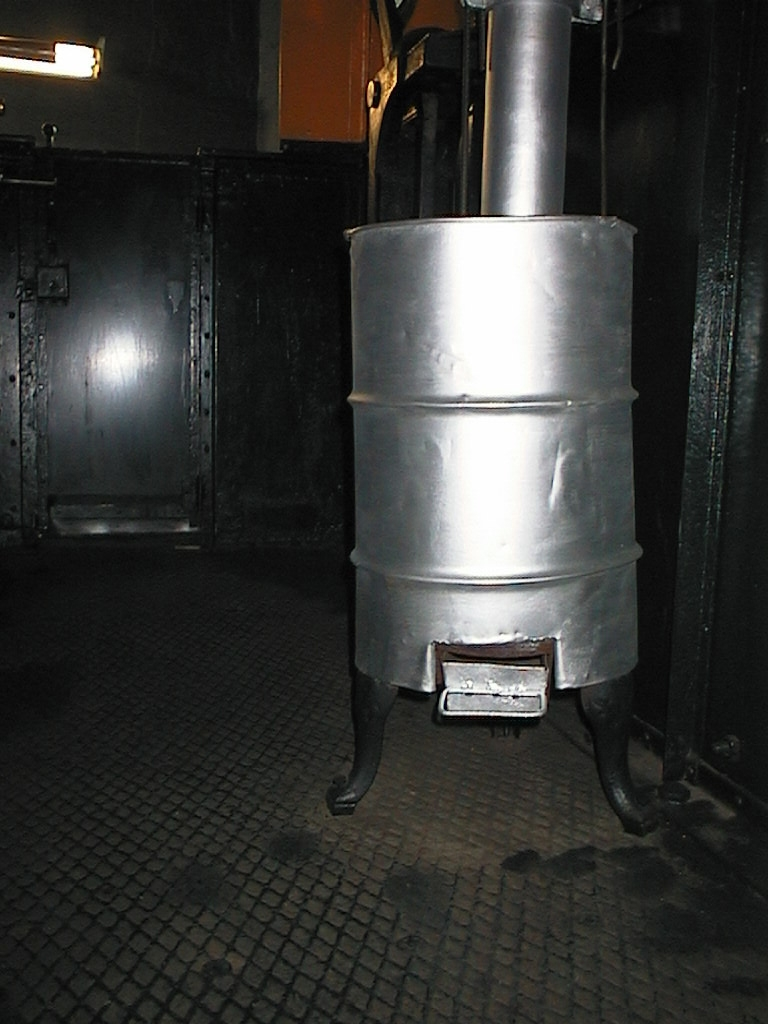 Hanomag 10594/1928, 0-4-2F -höyrysäiliöveturin kamiina Toijalan veturimuseossa